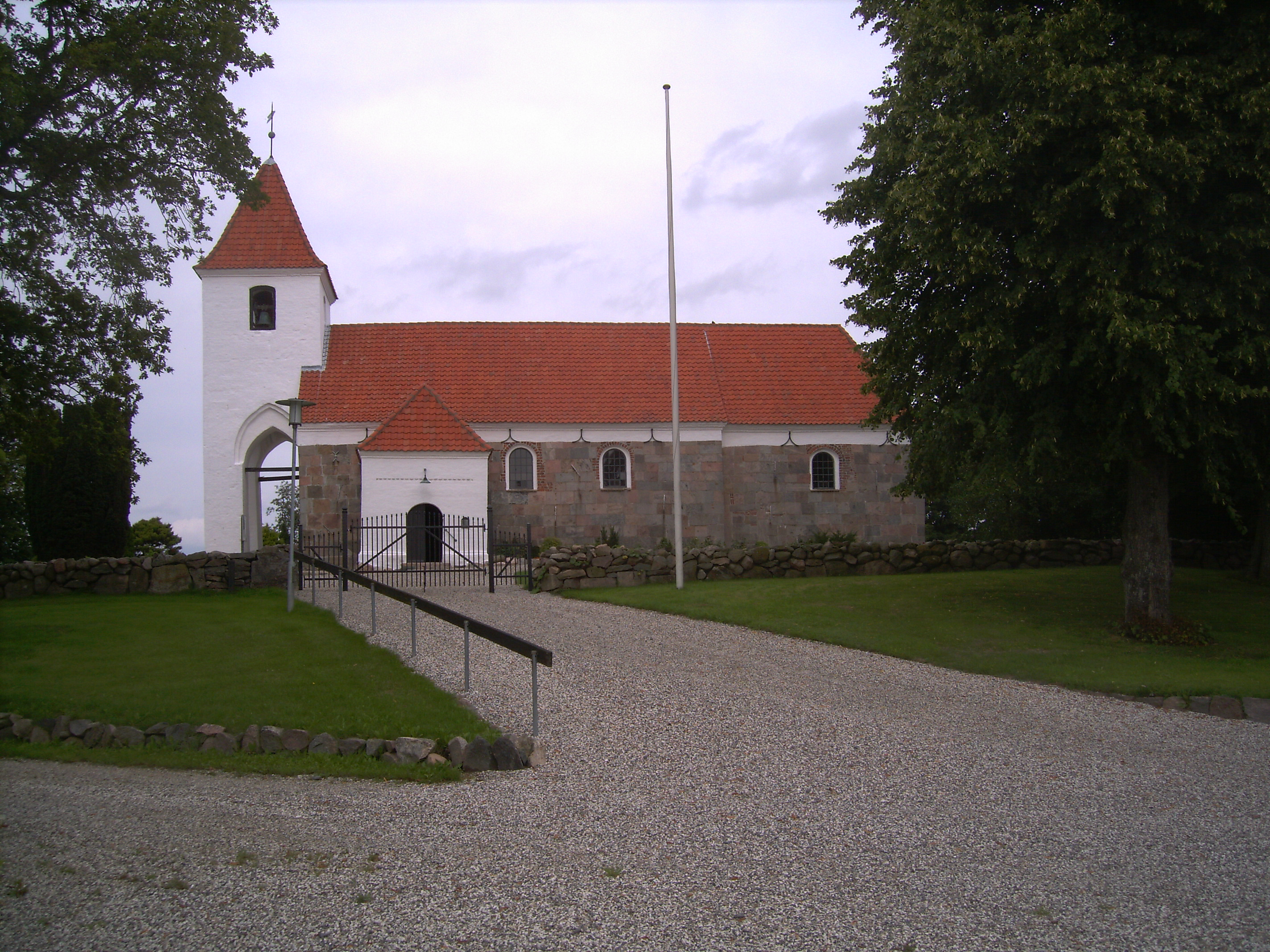 Voer Kirke,Rougsø Kommune, fra Syd